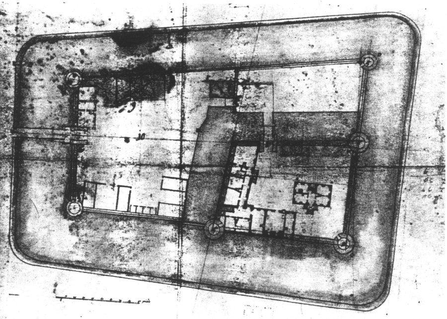 Schloss Marientraut, Grundriss